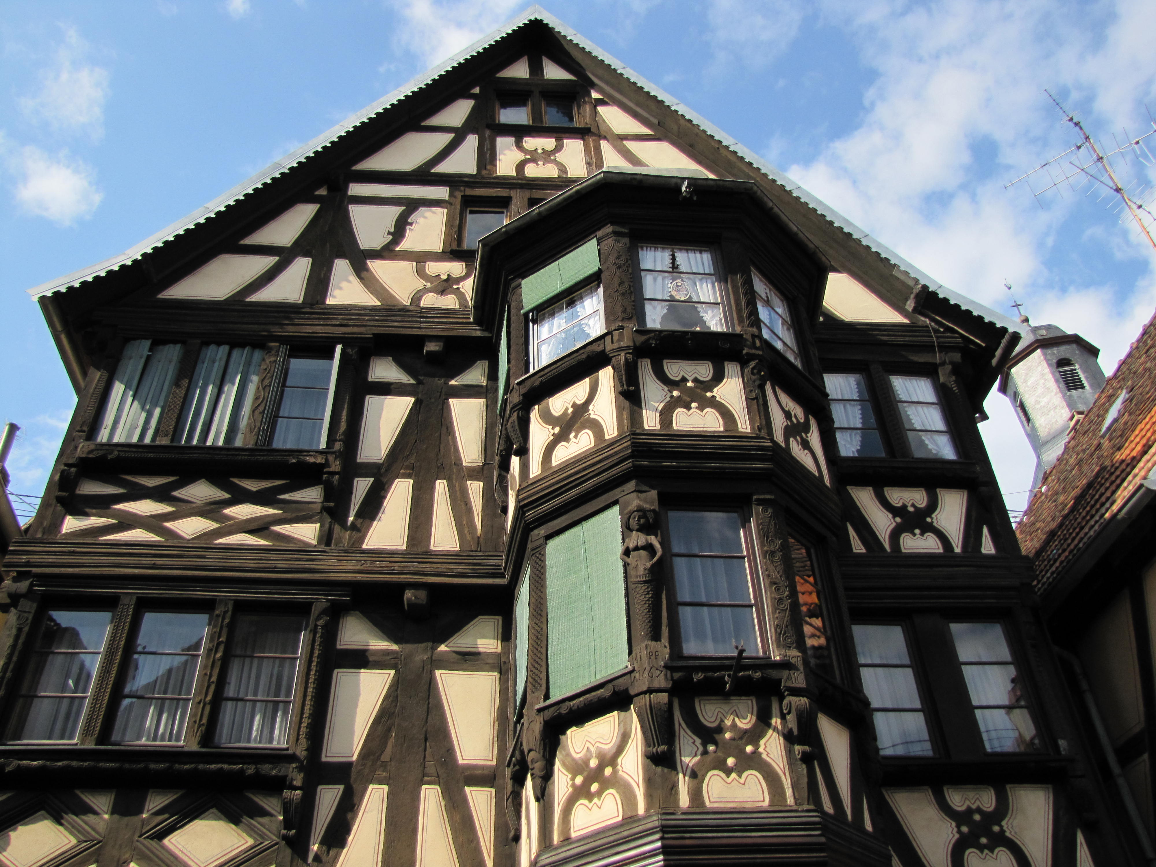 Alsace, Bas-Rhin, Bouxwiller, Maison de cordier dite maison Pflüger (1667), 29 Grand'Rue (PA00084650, IA67009634).